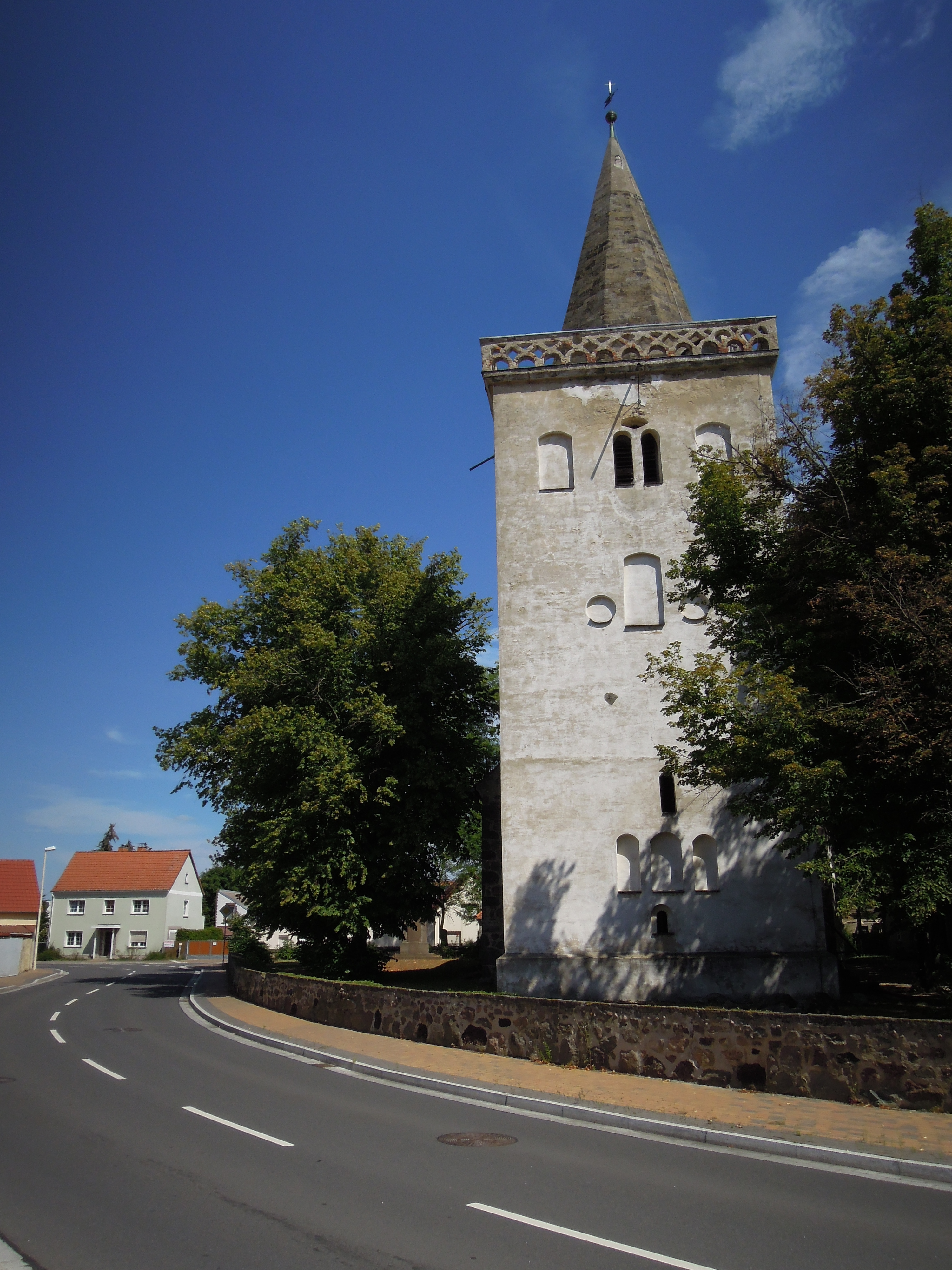 Kirche Trebitz -Westansicht mit Kirchturm- im August 2020